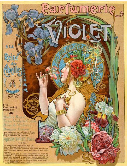 Add for Parfumerie Violet, American Poster designed Hingre (1900).